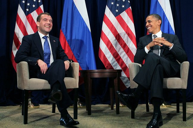 По итогам переговоров Дмитрий Медведев и Президент США Барак Обама сделали заявления для прессы.